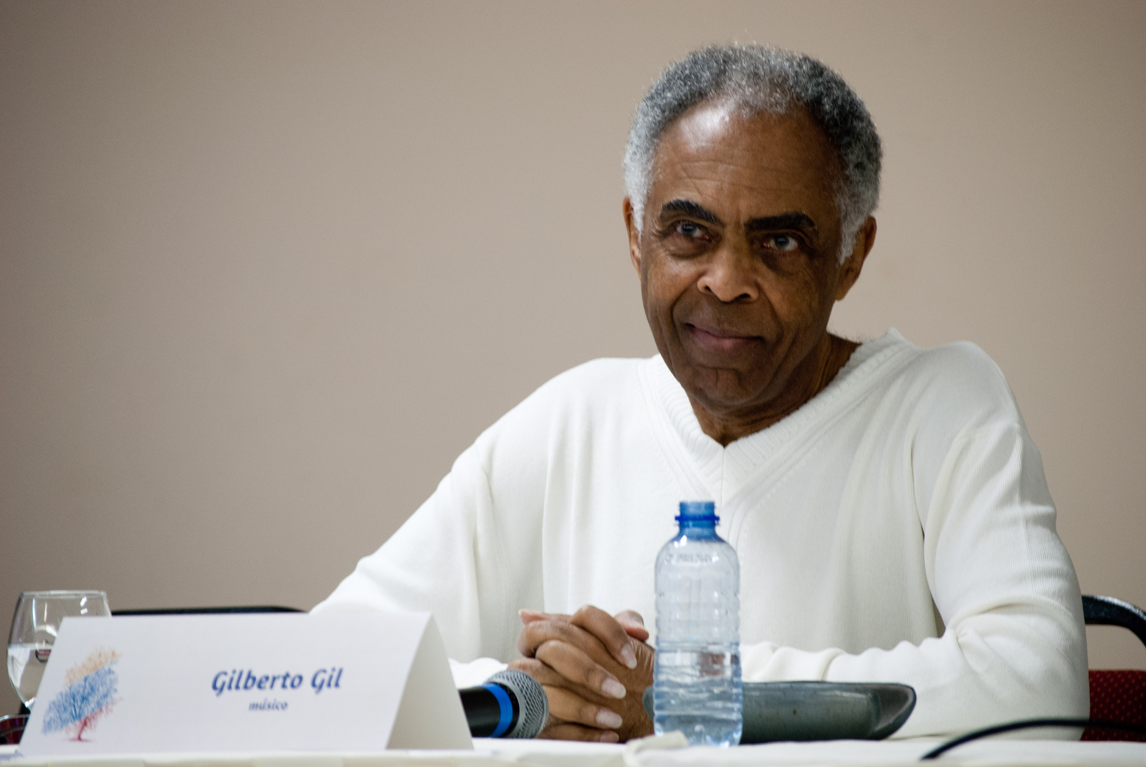 Gilberto Gil contemplativo. O quizás, meditabundo.